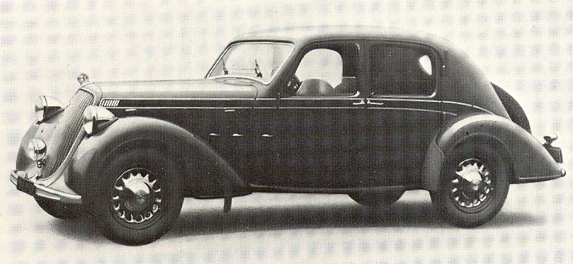 Steyr 220 Saloon 4 doors (1937)